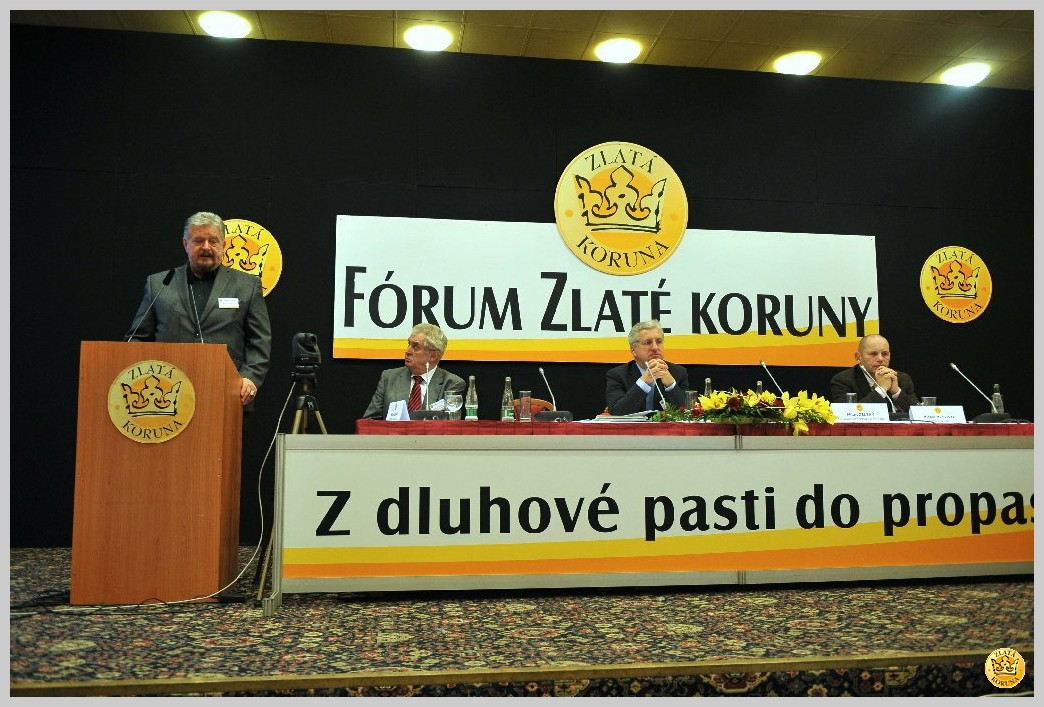 Milan Zelený a prezident Miloš Zeman